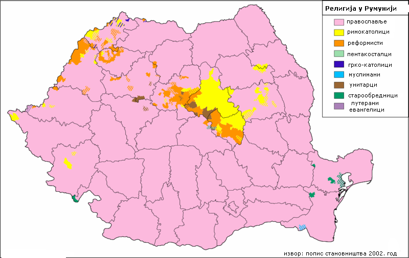 Религија у Румунији